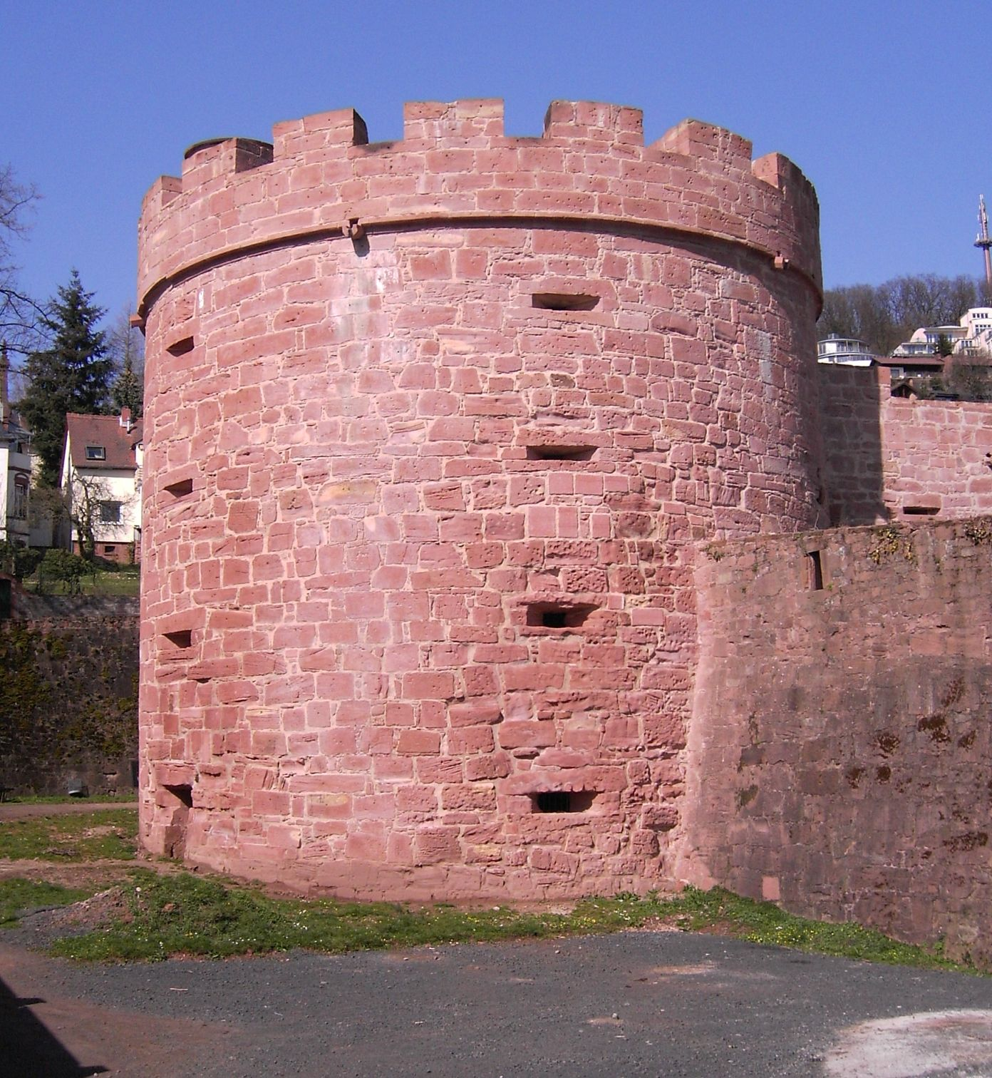 Büdingen, Großes Bollwerk